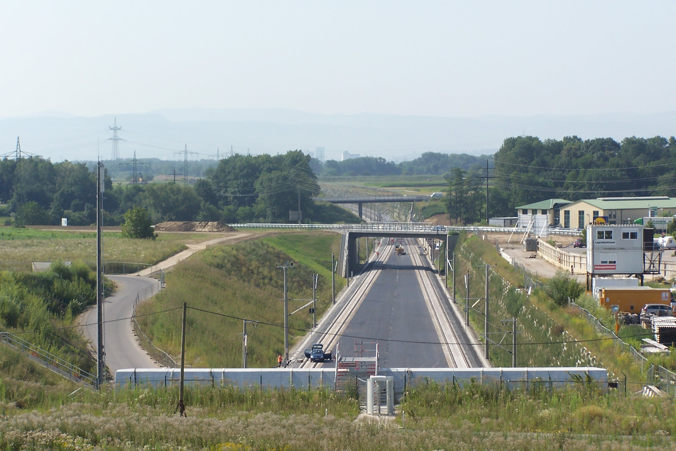 Blick Richtung Basel oberhalb des Katzenbergtunnels